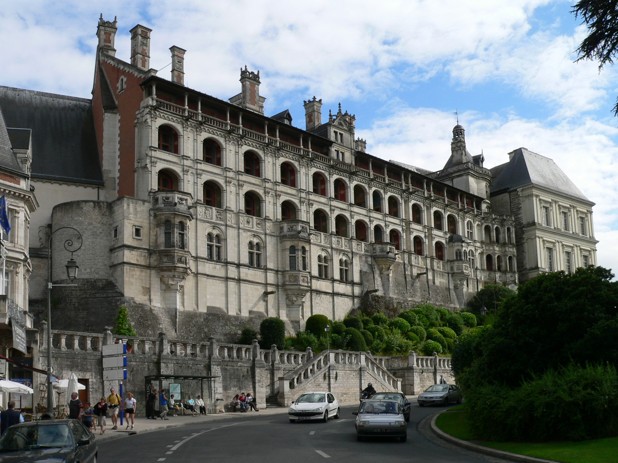 Rückseite des Schlosses in Blois, Frankreich